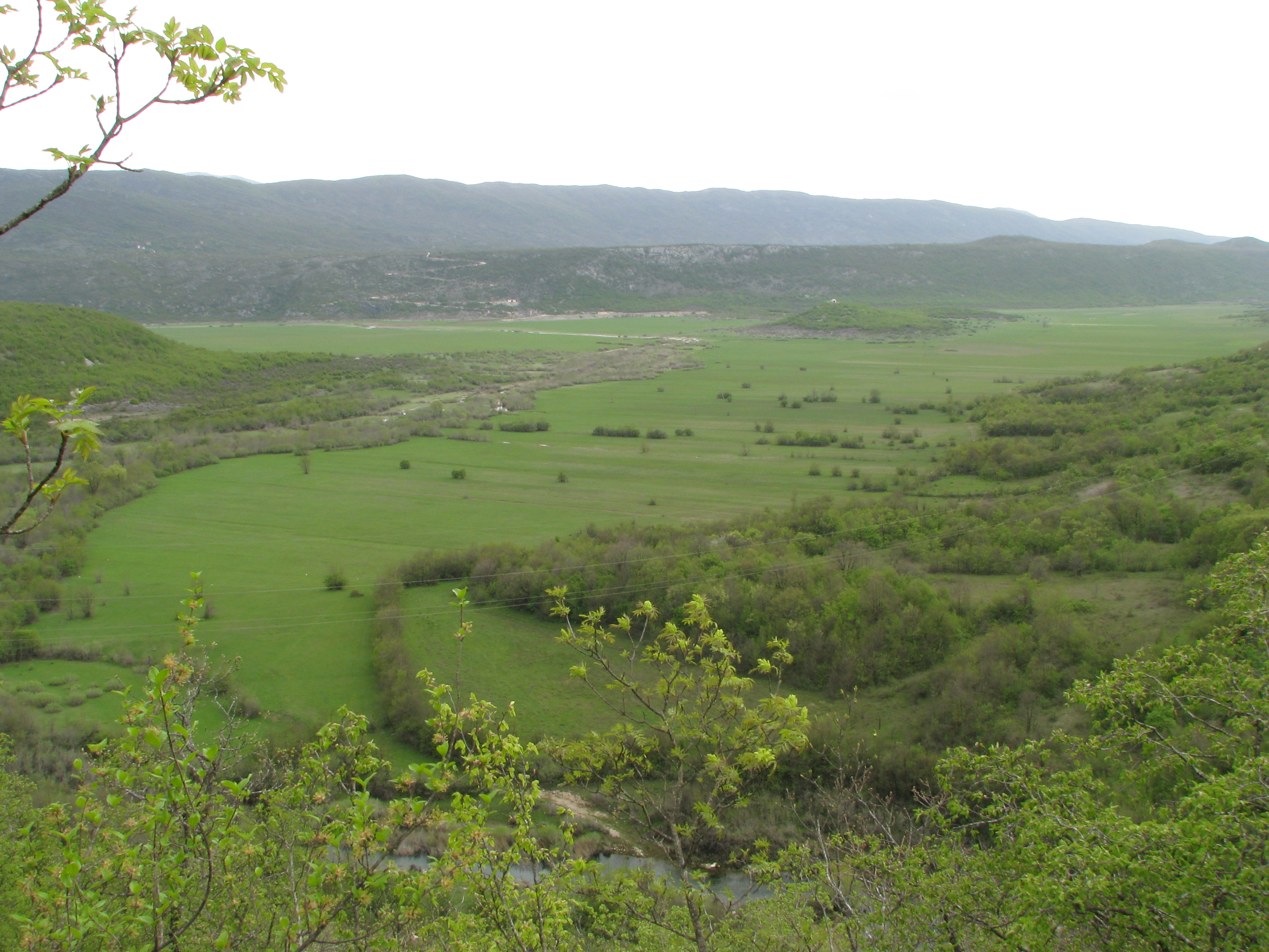 PUP007 Područje upravljanja staništem Fatničko polje. Fotografija napravljena krajem aprila kada su se povukle visoke zimske vode.